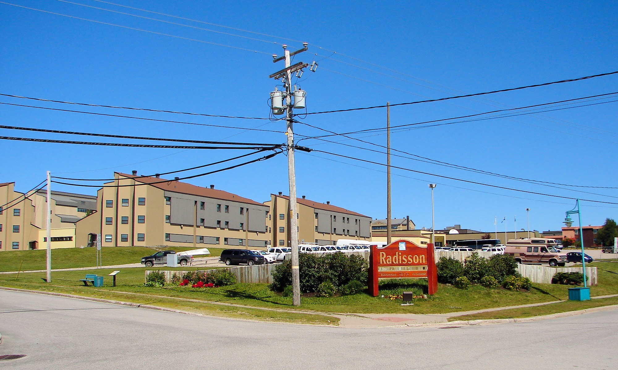 Radisson, Quebec, Canada